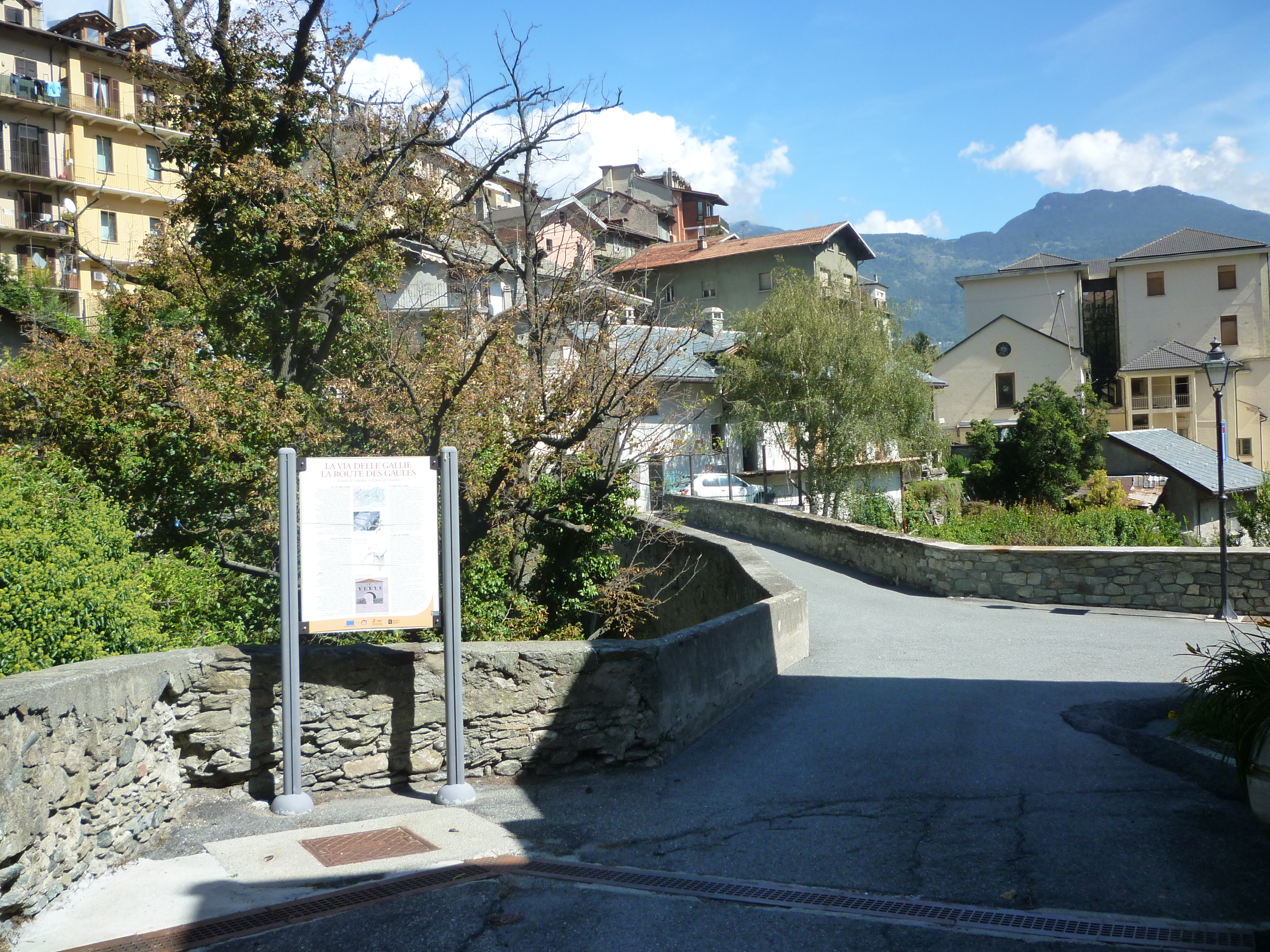 Pont romain à (Châtillon, Vallée d'Aoste)